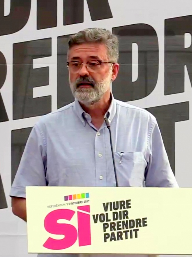 Carles Riera Diputat de la CUP a la comissió d'Ensenyament.La CUP ha exposat com a tret fonamental que, en el compte enrere per a l'1-O, no hi ha espai per als indecisos qui no vulguin arribar fins a les últimes conseqüències al referèndum que facin un pas al costat. i que cal 'prendre partit' en la celebració del referèndum amb un 'sí' que faci possible la transformació social del país i la consecució de la República Catalana. Aquesta és la proclama que ha llençat la CUP en un acte a la plaça de Barcelona, des d’eon ha arrencat la seva campanya nacional per mobilitzar la població. Ha llençat un missatge a l'alcaldessa Mercè Conesa i al PDeCAT en el camí per a l’assoliment de la independència. Es tracta d’una gira per 40 ciutats, aquest mes de juliol, en què s’abordaran els avantatges que aportaria la independència en 8 eixos. 1er Eix, Educació. A la Plaça Barcelona Laura Alegre, Núria Gibert i Carles Riera ens parlen sobre educació per lo que cal #prenpartit per l’educació pública i de qualitat..